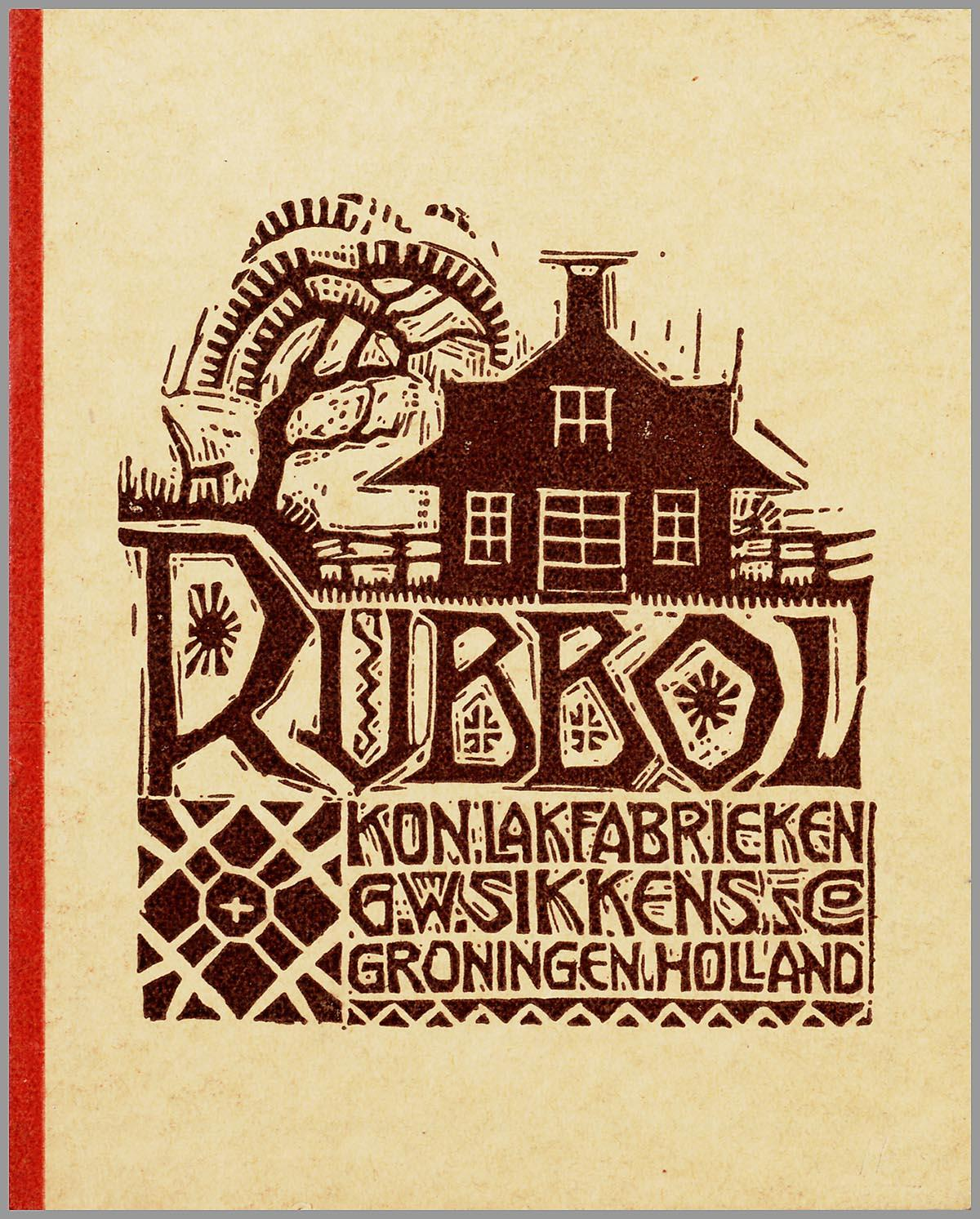 Brochure: Rubbol. Opdrachtgever/adverteerder: Koninklijke Lak- & Japanlakfabrieken G.W. Sikkens & Co. (Groningen).